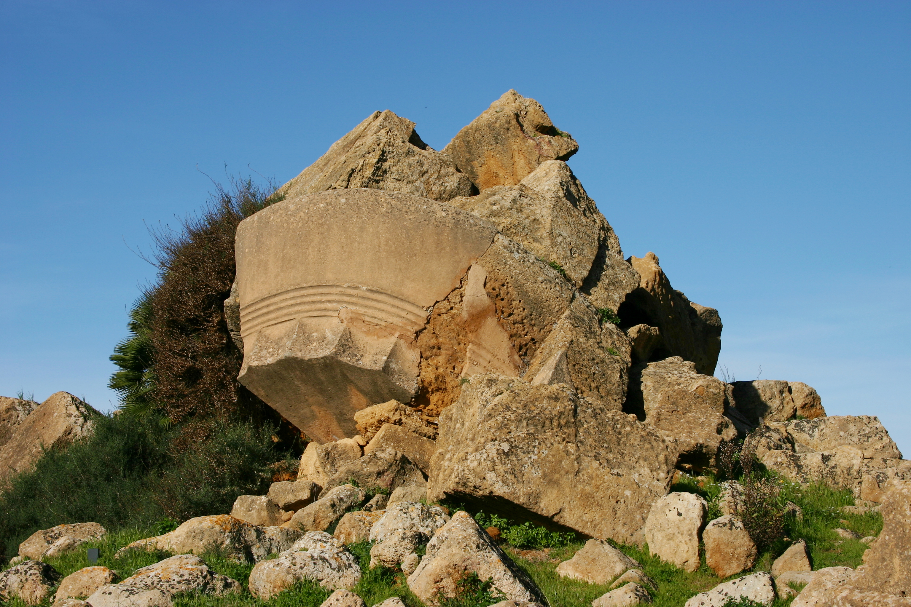 Temple of Zeus - Valle dei Templi